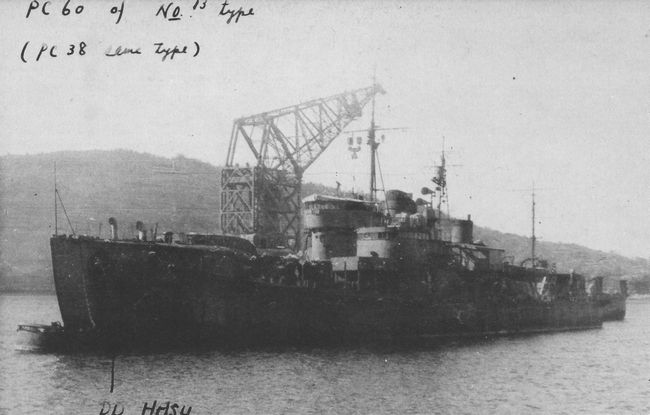 復員庁特別輸送艦「駆潜第六十号」（手前）と「蓮」（奥）